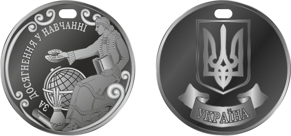 Cрібна шкільна медаль «За досягнення у навчанні» (Україна)